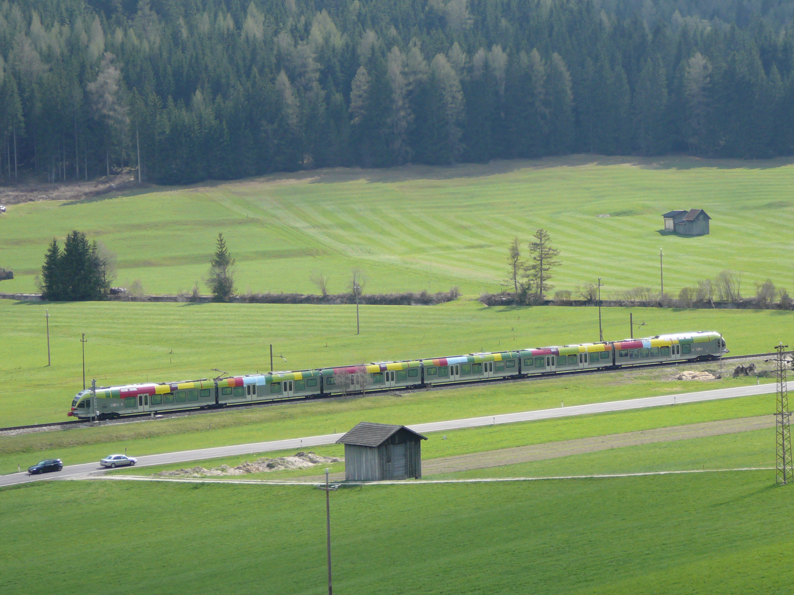 Neuer SAD-Triebwagen ETR 170 vom Typ FLIRT im Pustertal